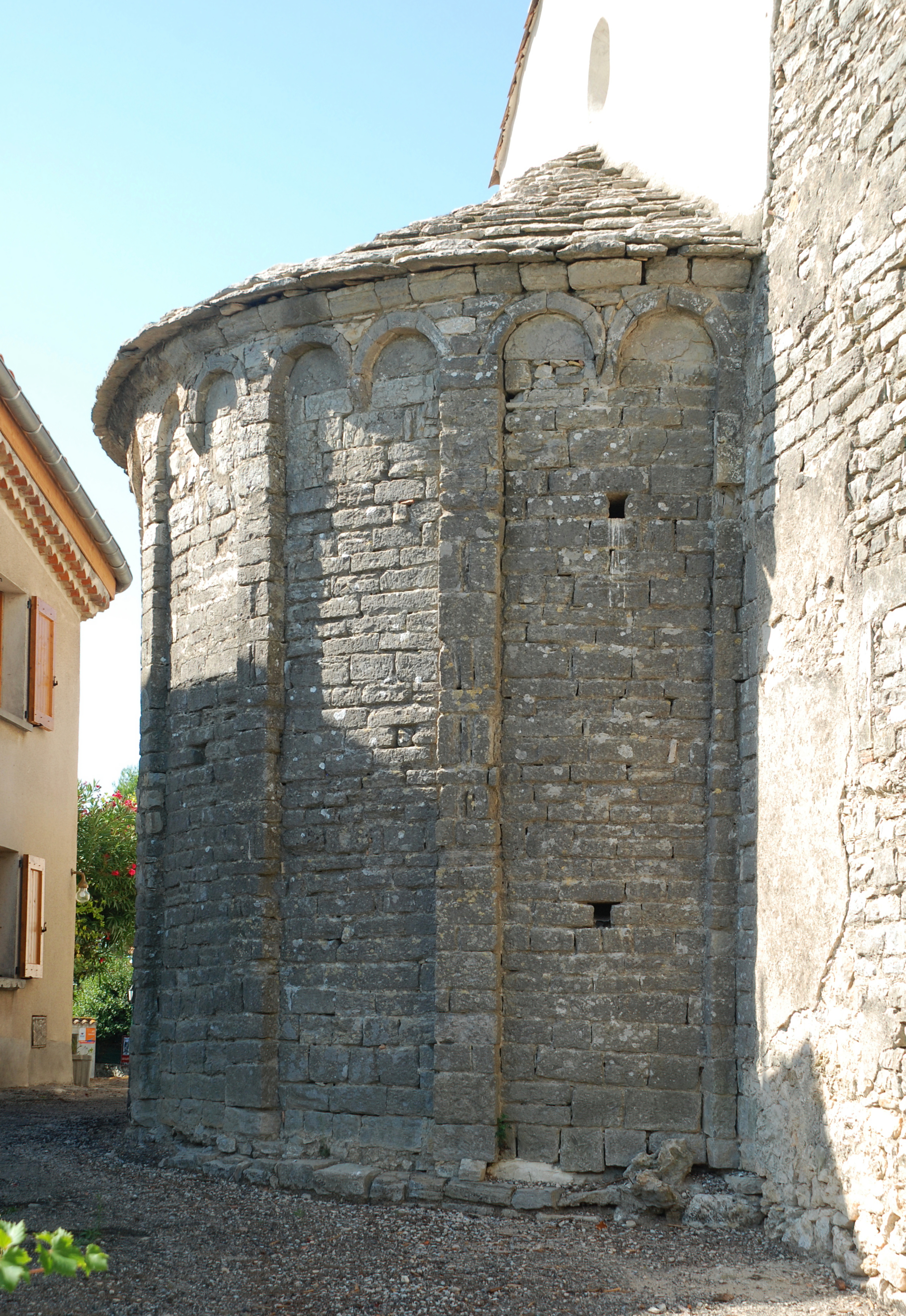 France - Hérault - Église Saint-Pierre de Valflaunès